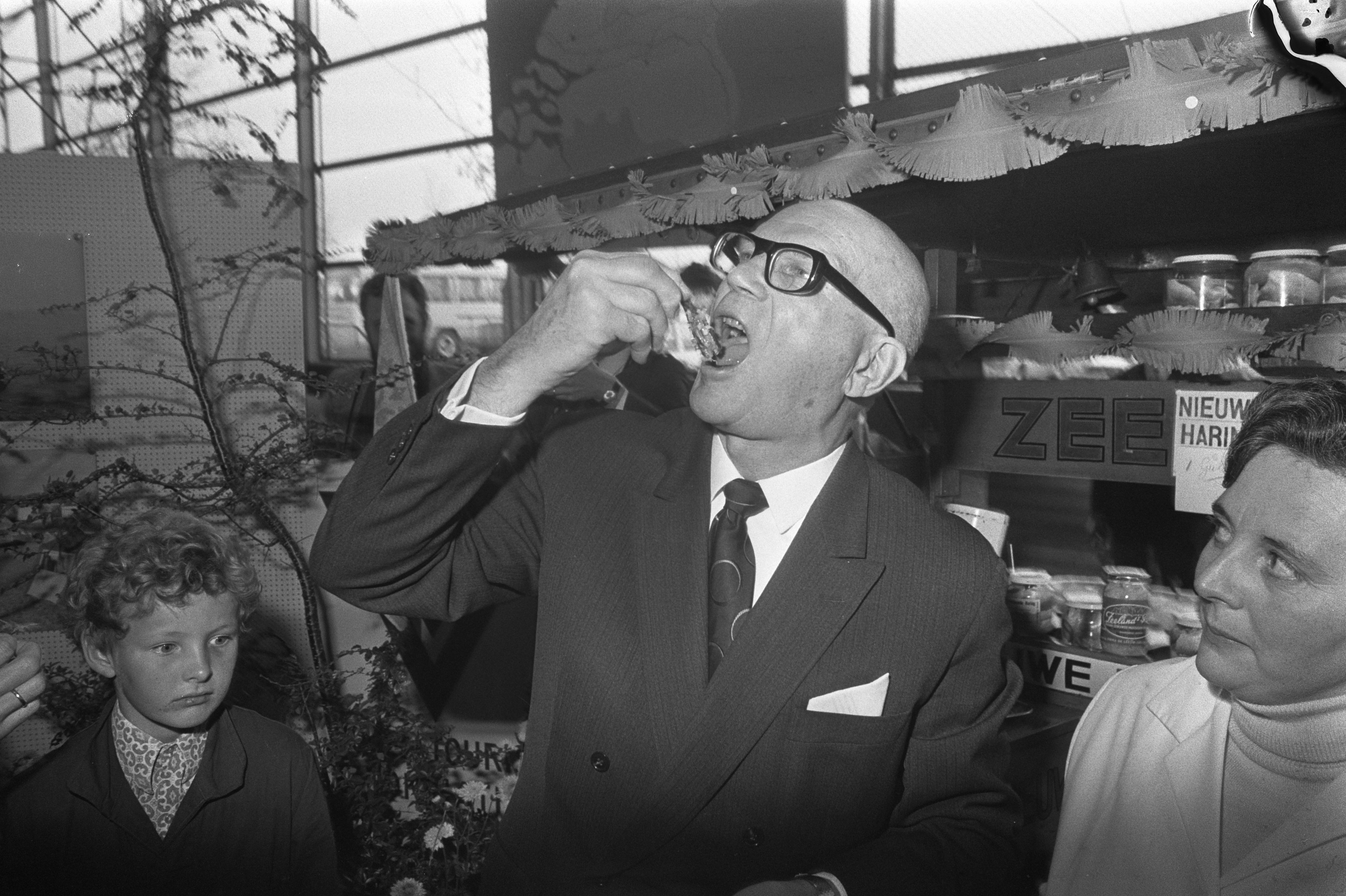 Collectie / Archief : Fotocollectie Anefo Reportage / Serie : Staatsbezoek president Kekkonen van Finland Beschrijving : Kekkonen en koningin Juliana brengen bezoek aan Flevopolder, Kekkonen eet haring Datum : 26 oktober 1972 Locatie : Flevoland, Flevopolder Trefwoorden : HARINGEN, koninginnen, presidenten, staatsbezoeken Persoonsnaam : Kekkonen, Urho Fotograaf : Rob Mieremet / Anefo Auteursrechthebbende : Nationaal Archief Materiaalsoort : Negatief (zwart/wit) Nummer archiefinventaris : bekijk toegang 2.24.01.05 Bestanddeelnummer : 925-9809